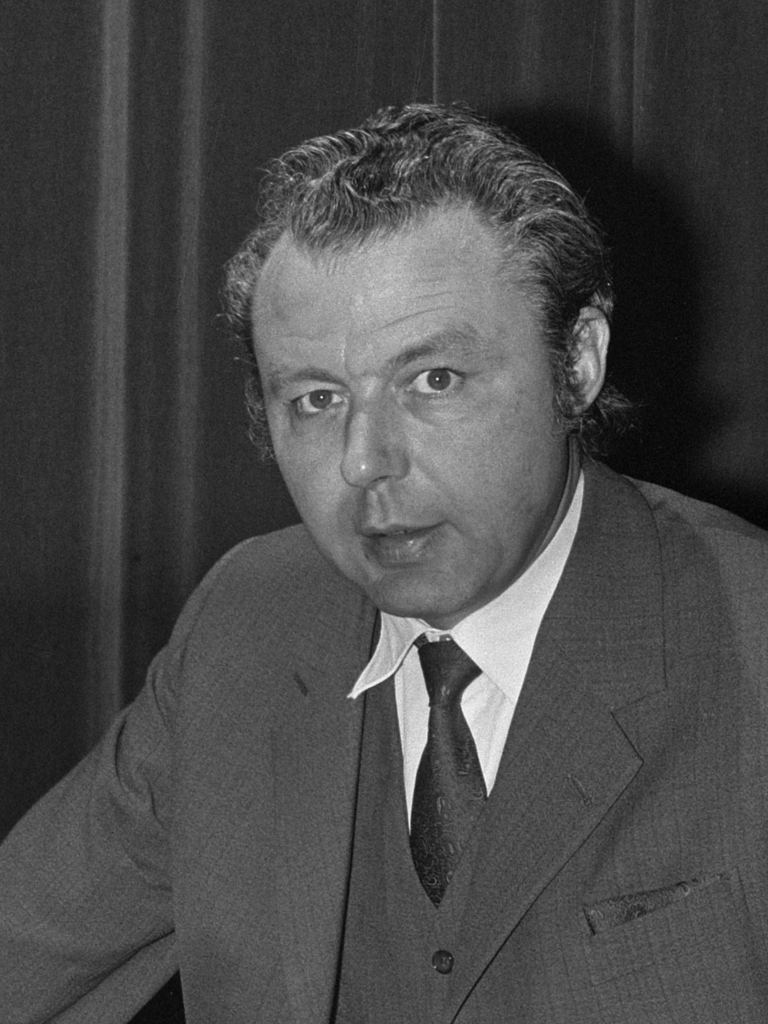 Verbondsvergadering van de NVV in het RAI-congrescentrum; Harry ter Heide 20 april 1972